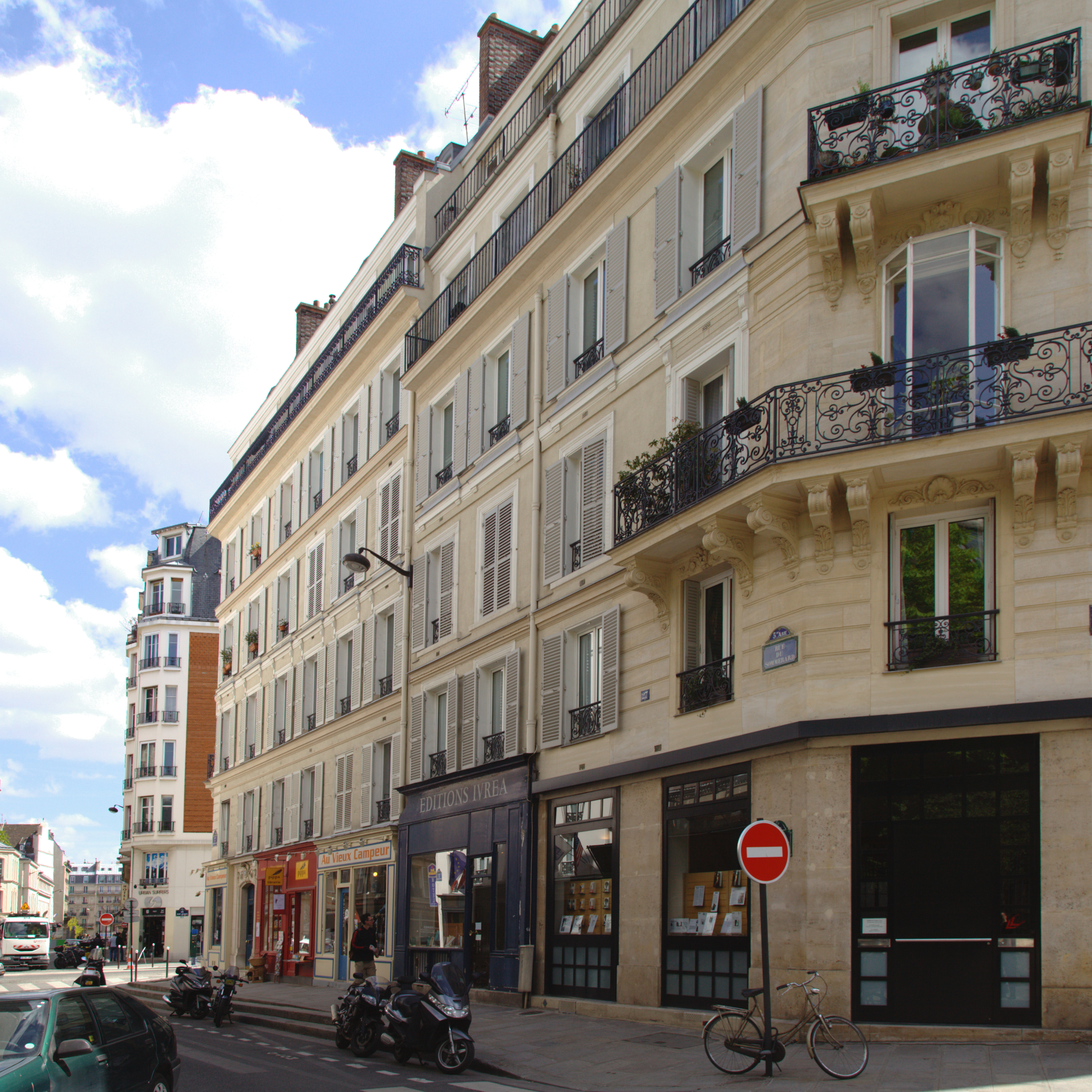 La rue du Sommerard à Paris. Vue sur le côté sud de la rue, entre la ruelade Cluny et la rue Saint-Jacques